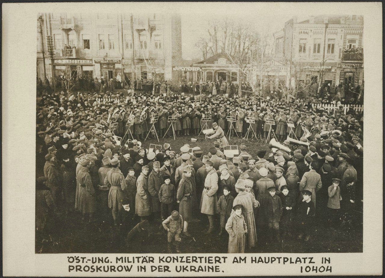 Австро-угорський військовий оркестр грає у Проскурові